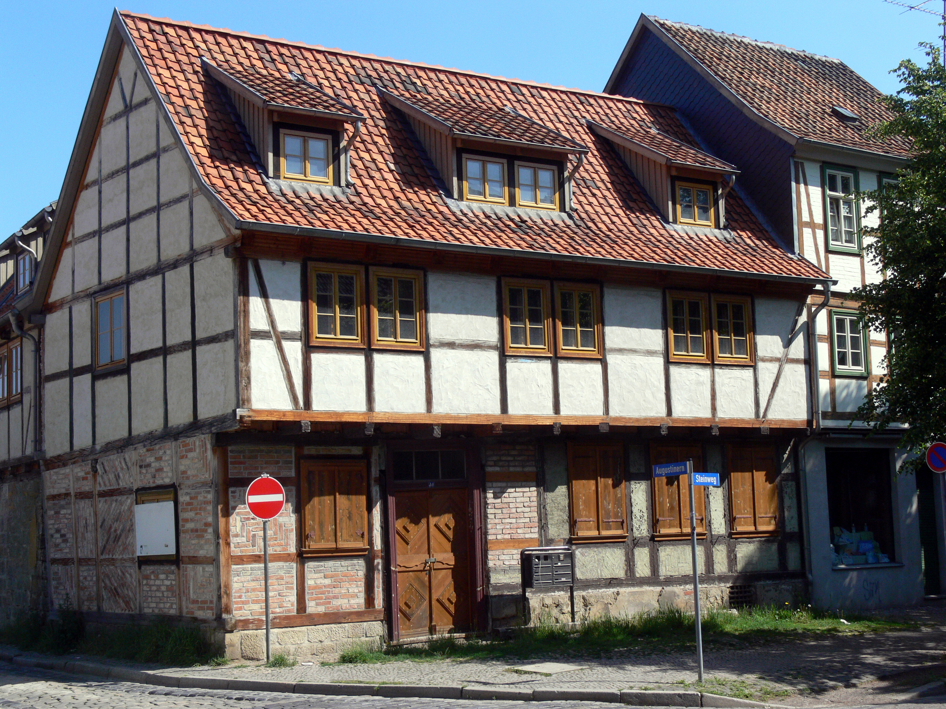 Haus Steinweg 40 in Quedlinburg, umfassend saniert Anfang der 2000er Jahre